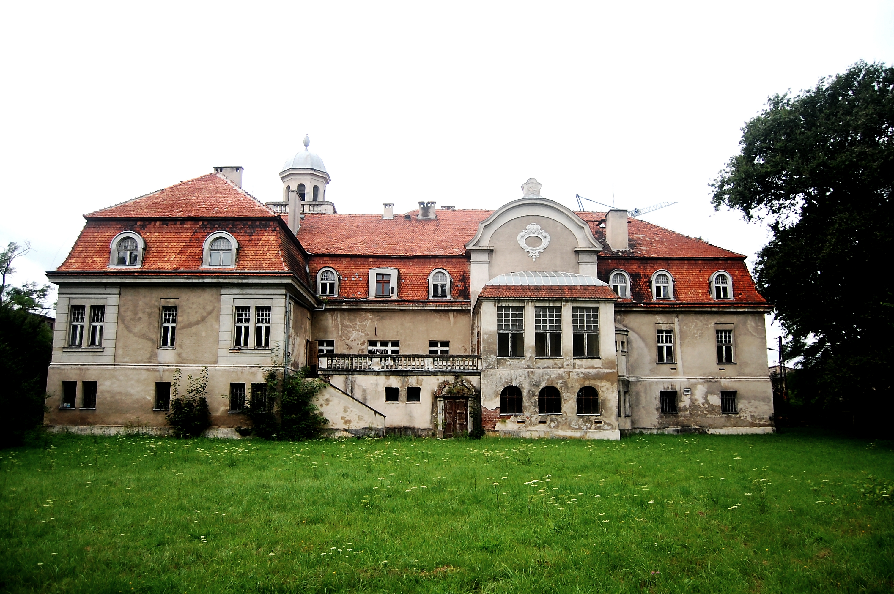 Lewin Brzeski, dom, 1 poł. XIX